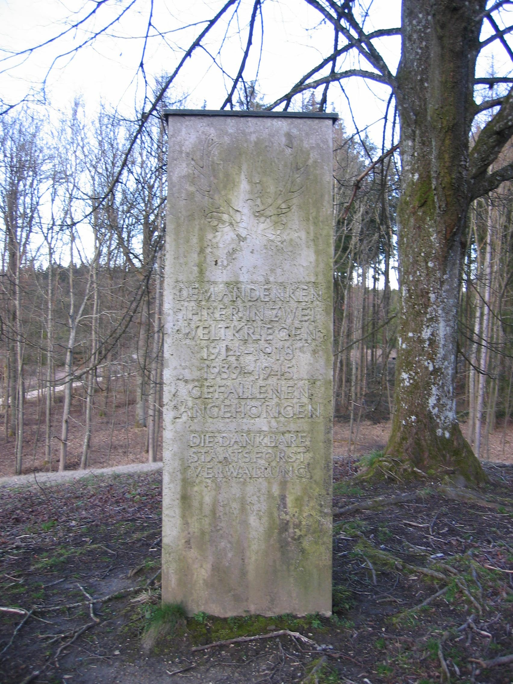 Stele auf dem keltischen Grabhügel Hohmichele bei Altheim